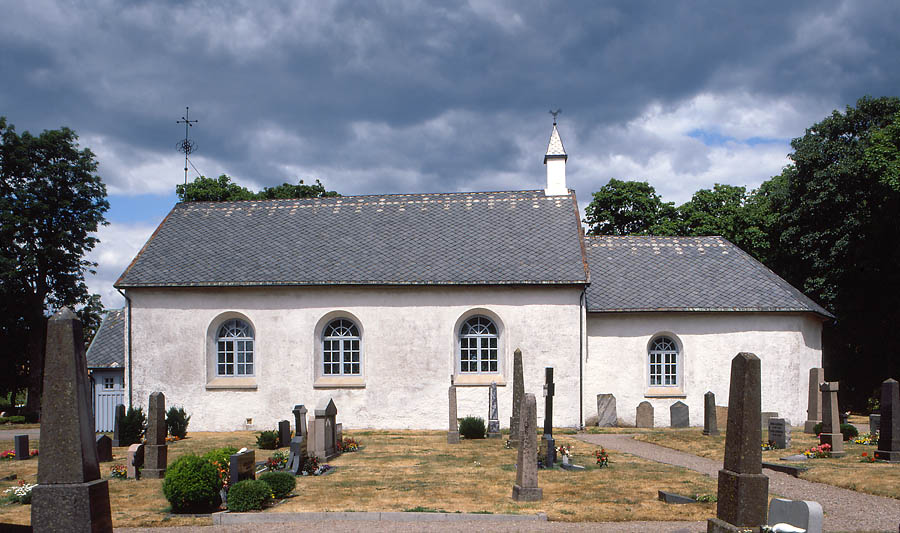 Sibbarps kyrka i Halland